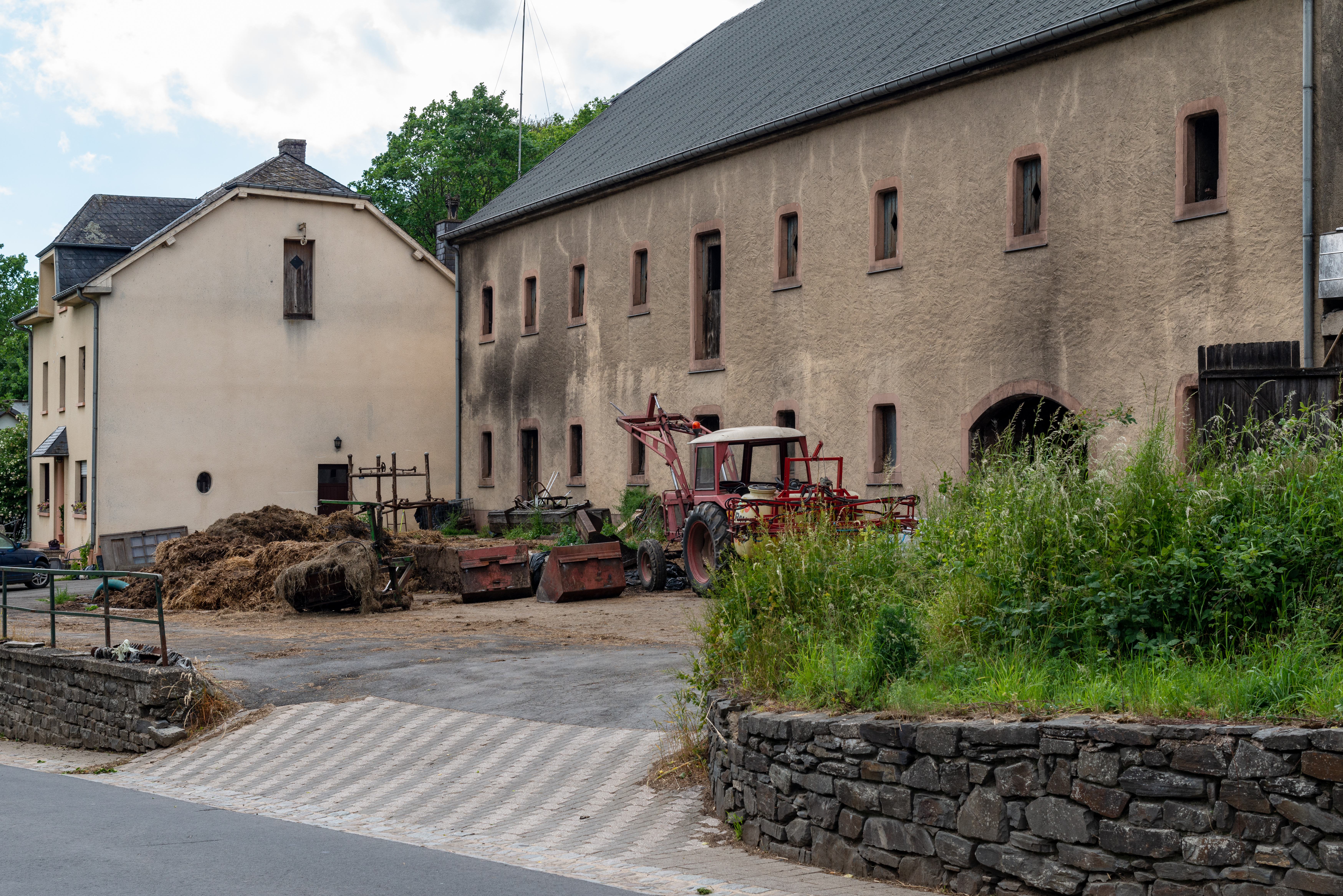 12, rue Jean-Baptiste-Determe, hautdesdaags deen eenzege Bauerenhaff zu Soller.Gebaut gouf den Haff vum Jean-Nicolas Determe, deem d'Ierfschaft vu sengem Brudder, dem Jean-Baptiste Determe, dëst wuel erlaabt huet.